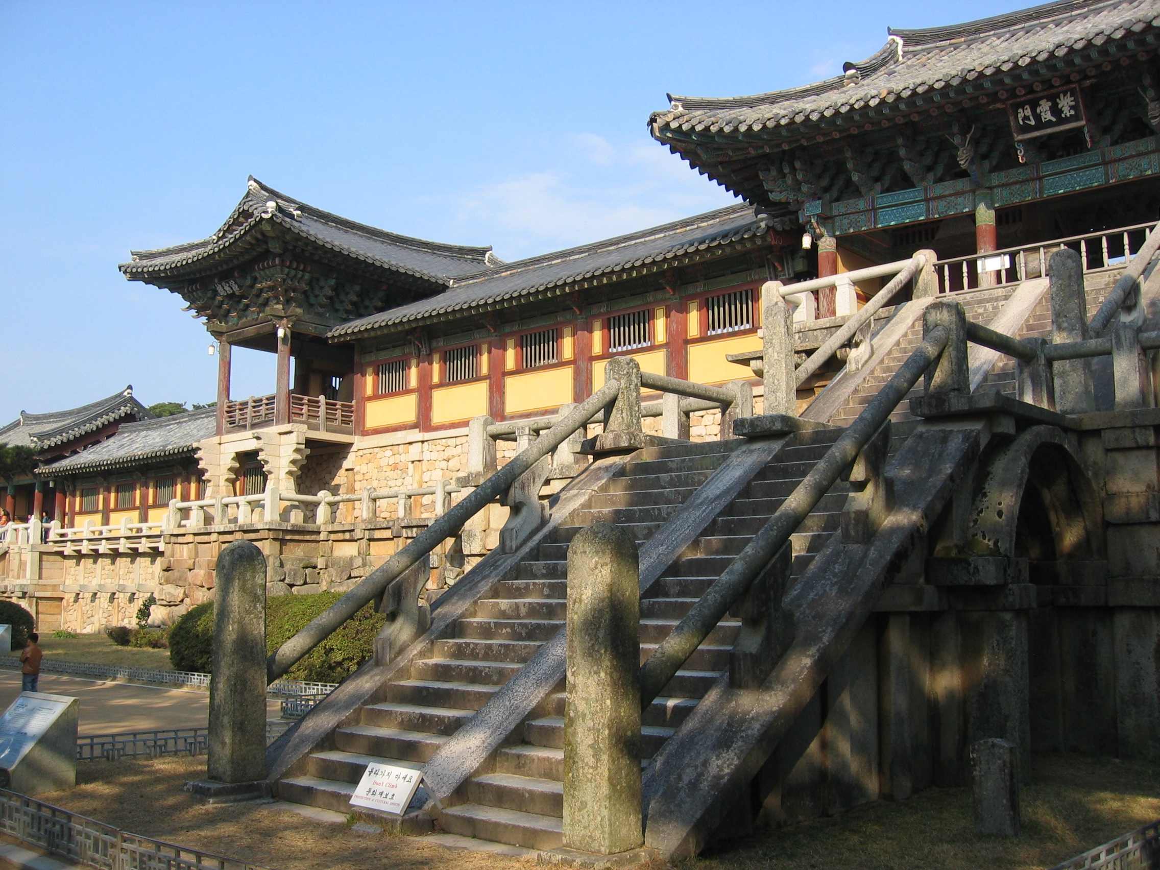 Bulguksa in Gyeongju, South Korea